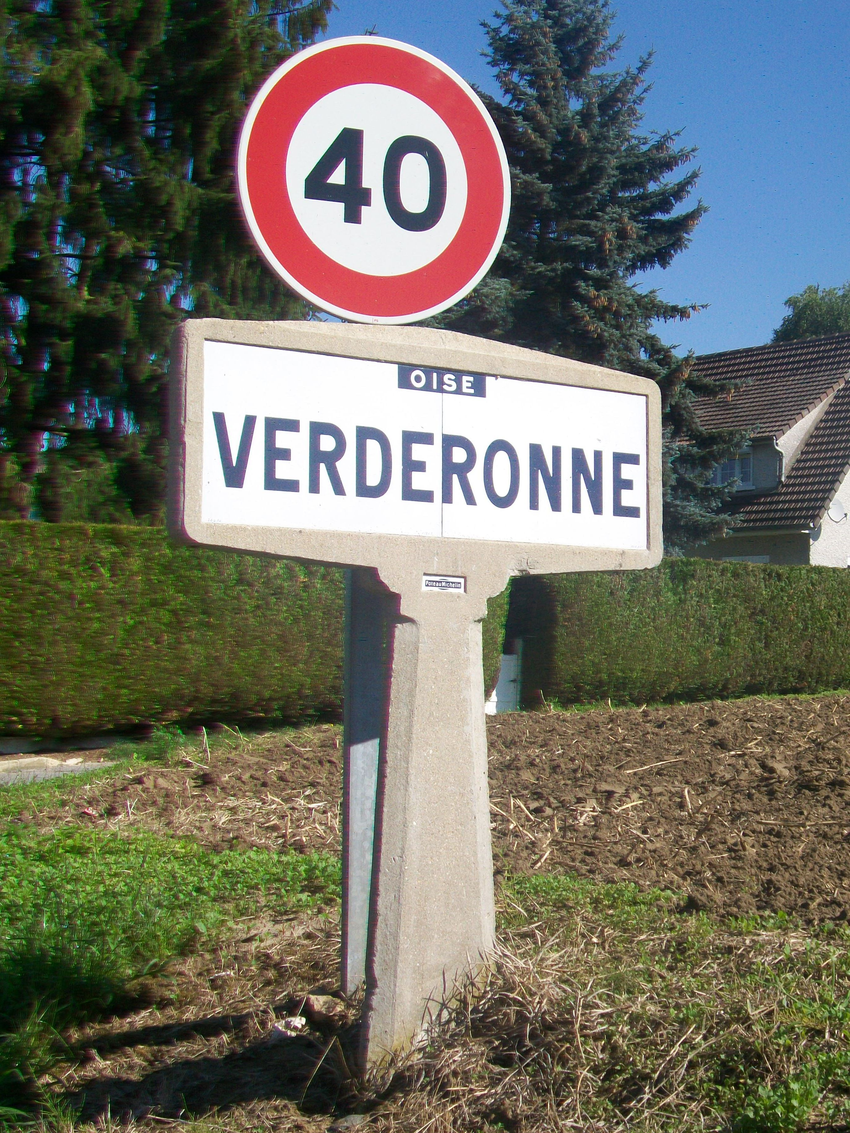 Plaque Michelin de 1934 à l'entrée du village depuis Angicourt, rue du Plantin.